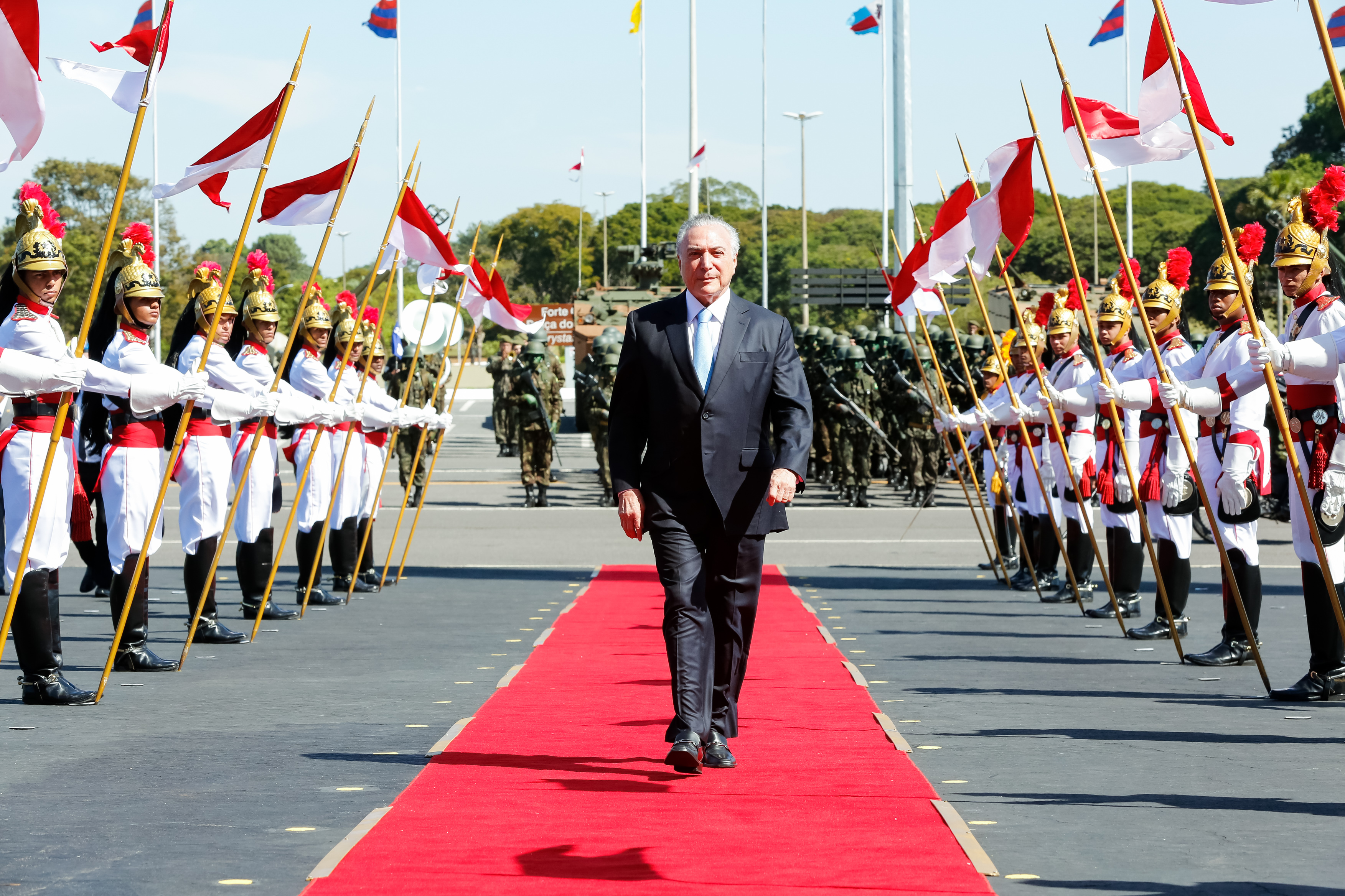 (Brasília - DF, 19/04/2017) Cerimônia Comemorativa ao Dia do Exército. Foto: Marcos Corrêa/PR